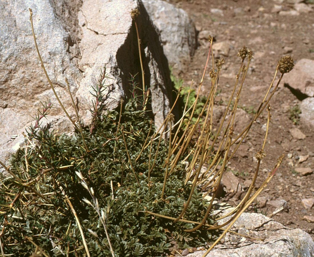 Acaena sericea, Rosengewächse (Rosaceae) - Argentinien/Argentina, Paso de Uspallata, Puente del Inca, ca. 2700 m s.m. (Prov. Mendoza)